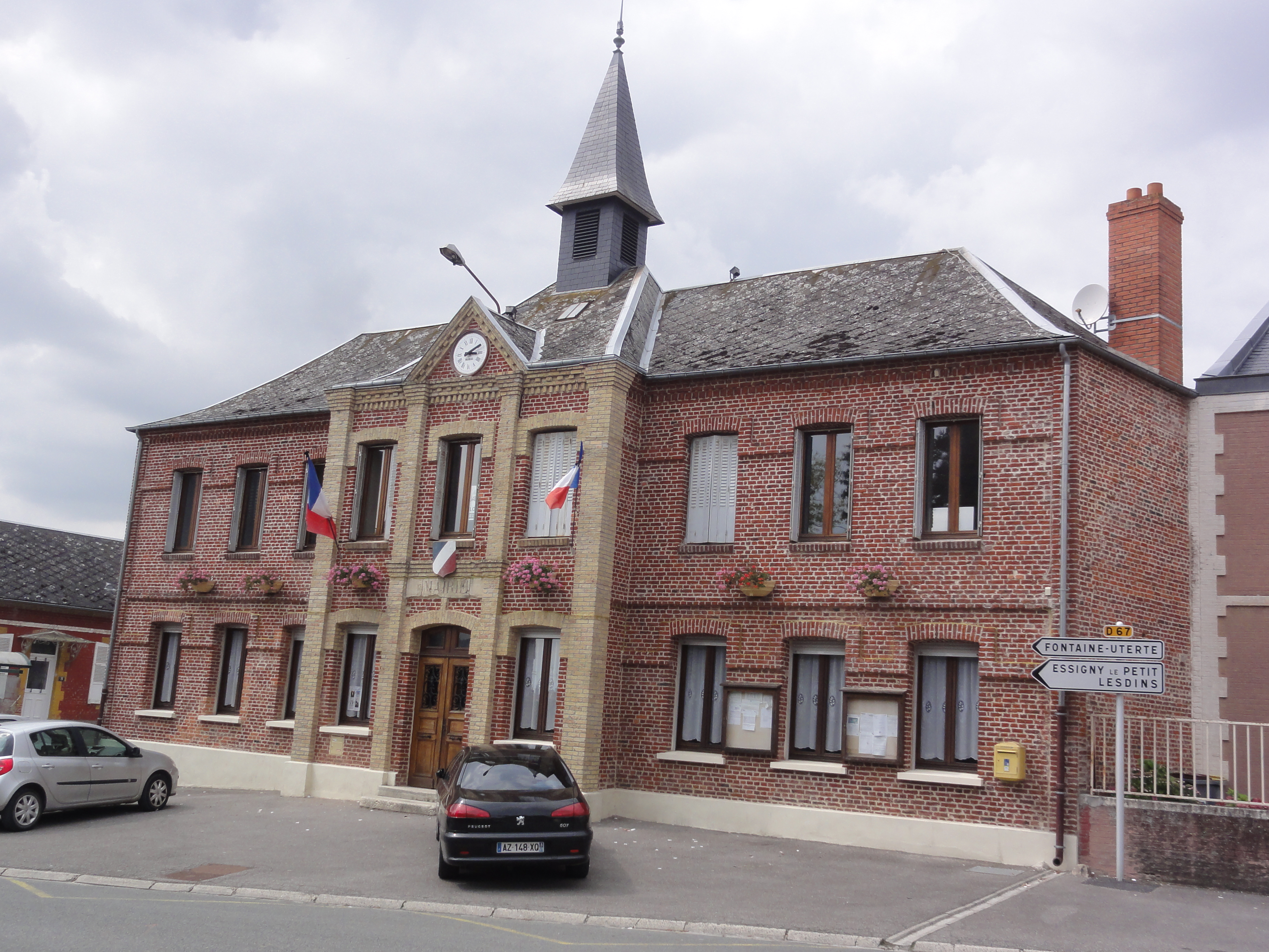 Fonsomme (Aisne) mairie